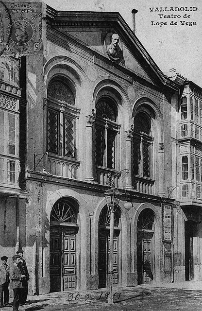 Teatro Lope de Vega - Valladolid - J. H. Valladolid. Postal circulada con texto manuscrito en francés y dirigida a Jane Rodet de Lyon. Año 1911. Sello con efigie del Rey. y es igual que la 1178 - Tarjeta postal. Papel 90 x 139 B/N